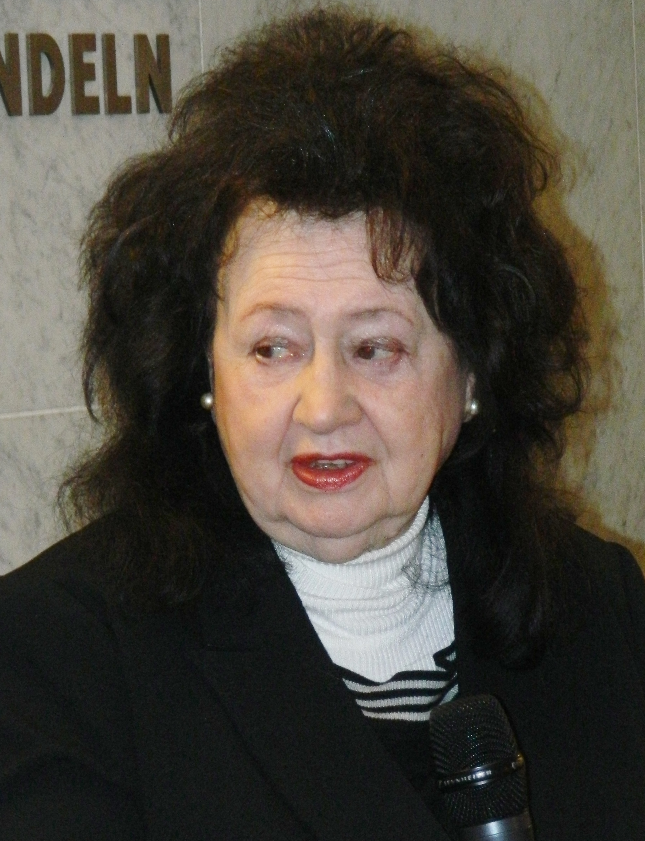 Eeva Akateemisen kirjakaupan kohtaamispaikalla 2019